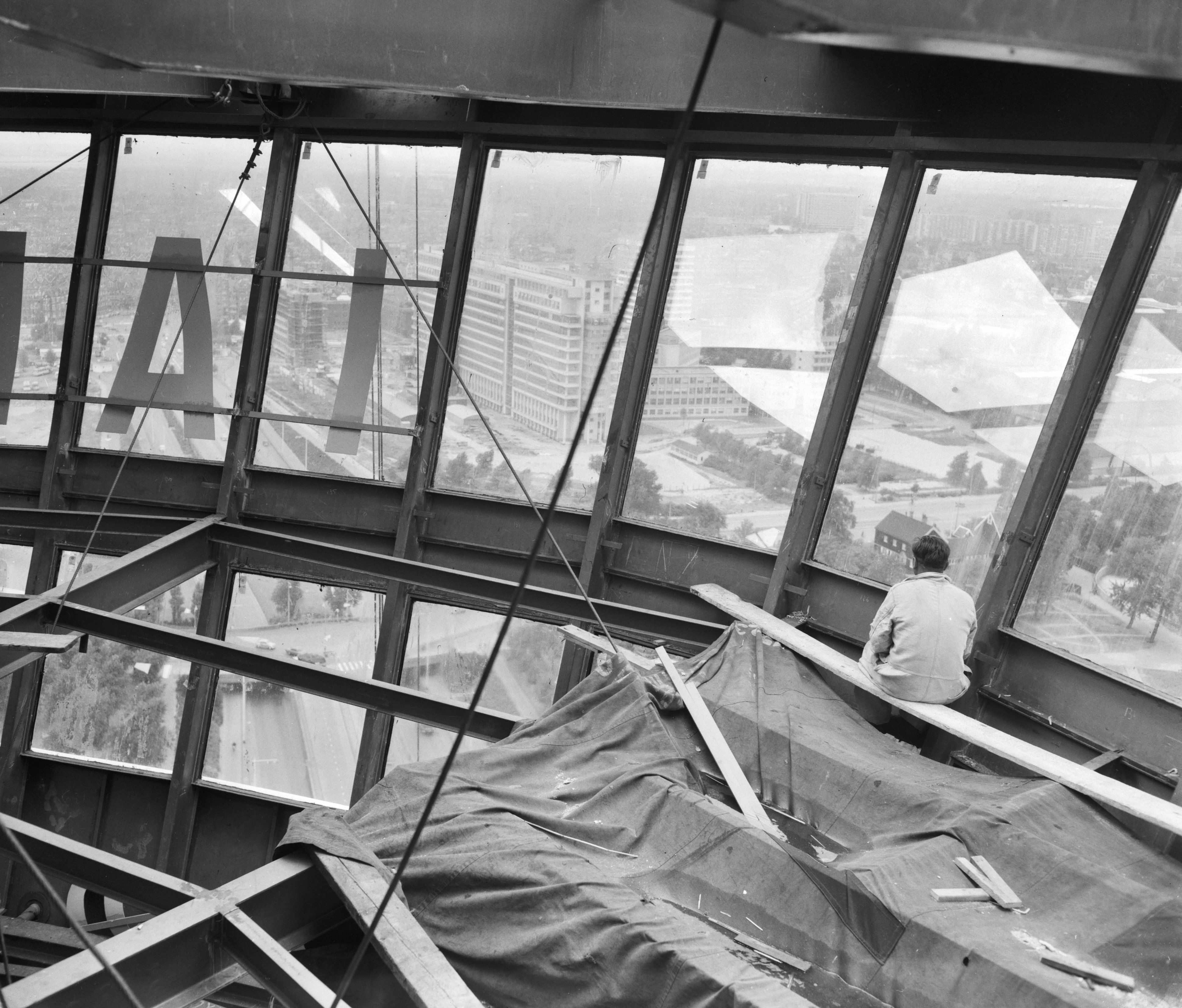 Collectie / Archief : Fotocollectie Anefo Reportage / Serie : De Euromast Beschrijving : Afwerken van restaurant in de Euromast te Rotterdam Annotatie : De Euromast (1958-1960) is ontworpen door architect H.A. Maaskant ter gelegenheid van de Floriade in Rotterdam in 1960. In 2010 is de Euromast aangewezen als Rijksmonument Datum : 15 juli 1959 Locatie : Rotterdam, Zuid-Holland Trefwoorden : bouw Fotograaf : Behrens, Herbert / Anefo Auteursrechthebbende : Nationaal Archief Materiaalsoort : Negatief (zwart/wit) Nummer archiefinventaris : bekijk toegang 2.24.01.04 Bestanddeelnummer : 910-5314